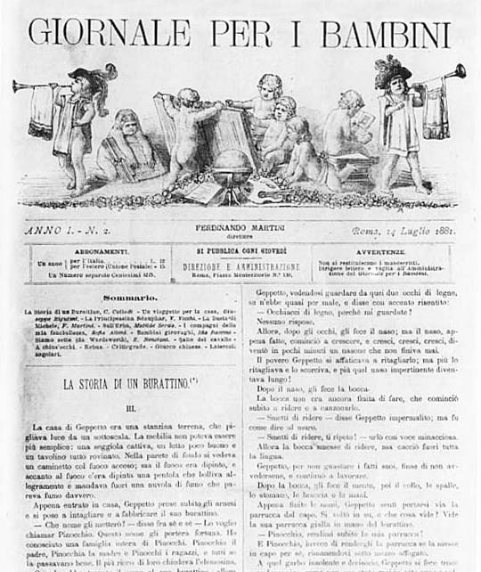 Prima pagina del "Giornale per i bambini" del 14 luglio 1881 (secondo numero del primo anno) con il terzo capitolo di "La storia di un burattino" di Collodi, poi diventato "Le avventure di Pinocchio. Storia di un burattino" In questo terzo capitolo compare per la prima volta il nome del burattino protagonista: Pinocchio.